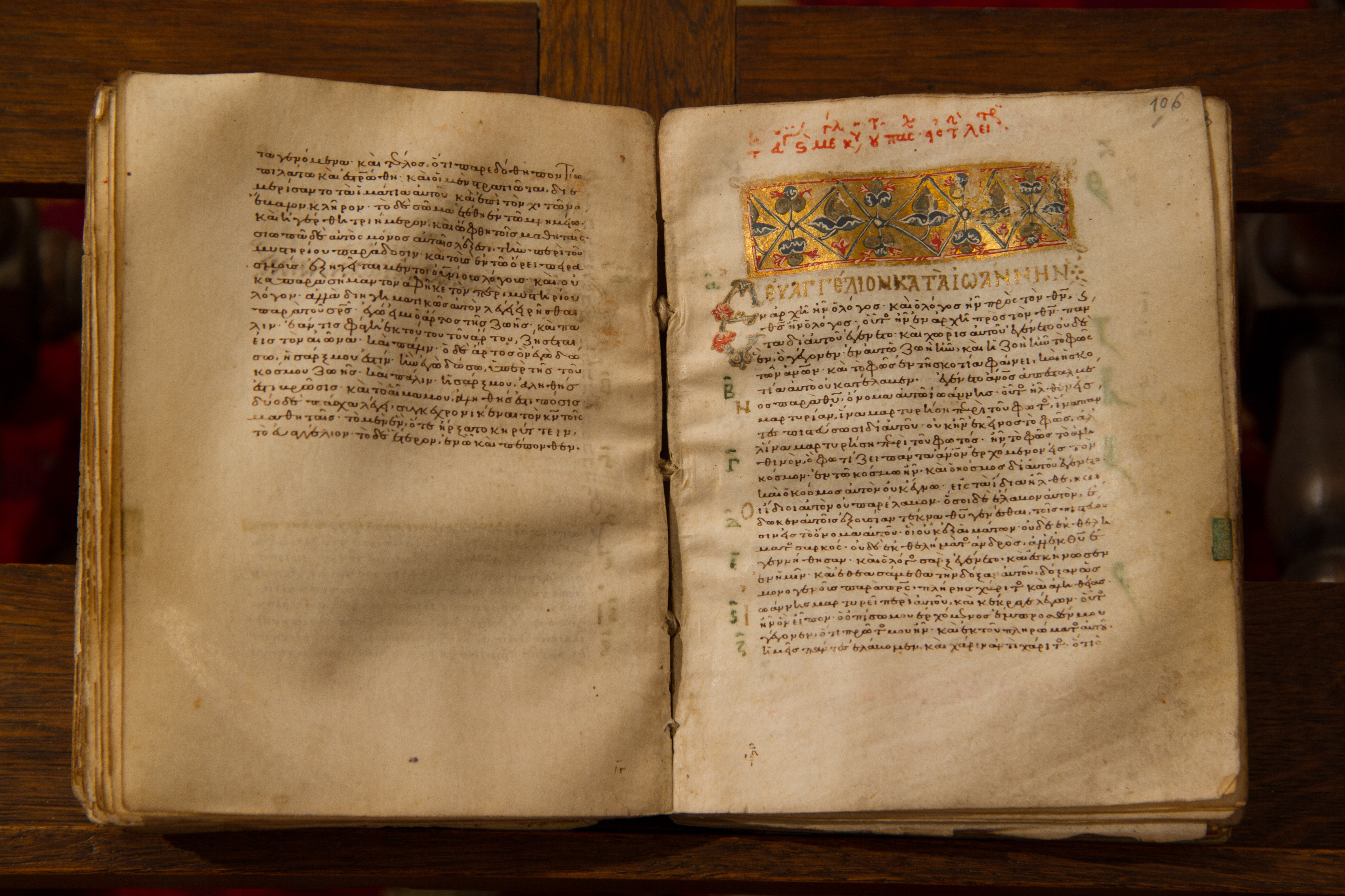 Bible grecque du XIe siècle offerte par la duchesse d’Andlau